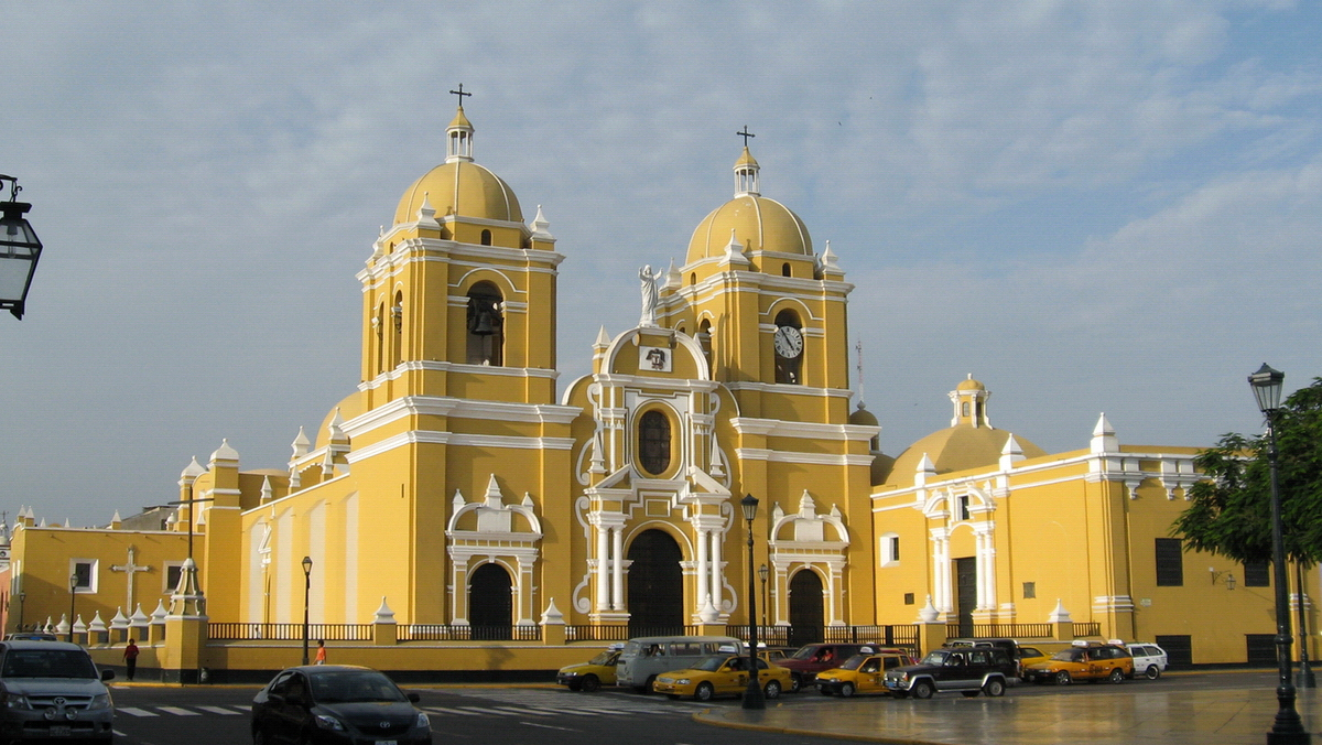 Toma de la catedral de trujillo (Perú)